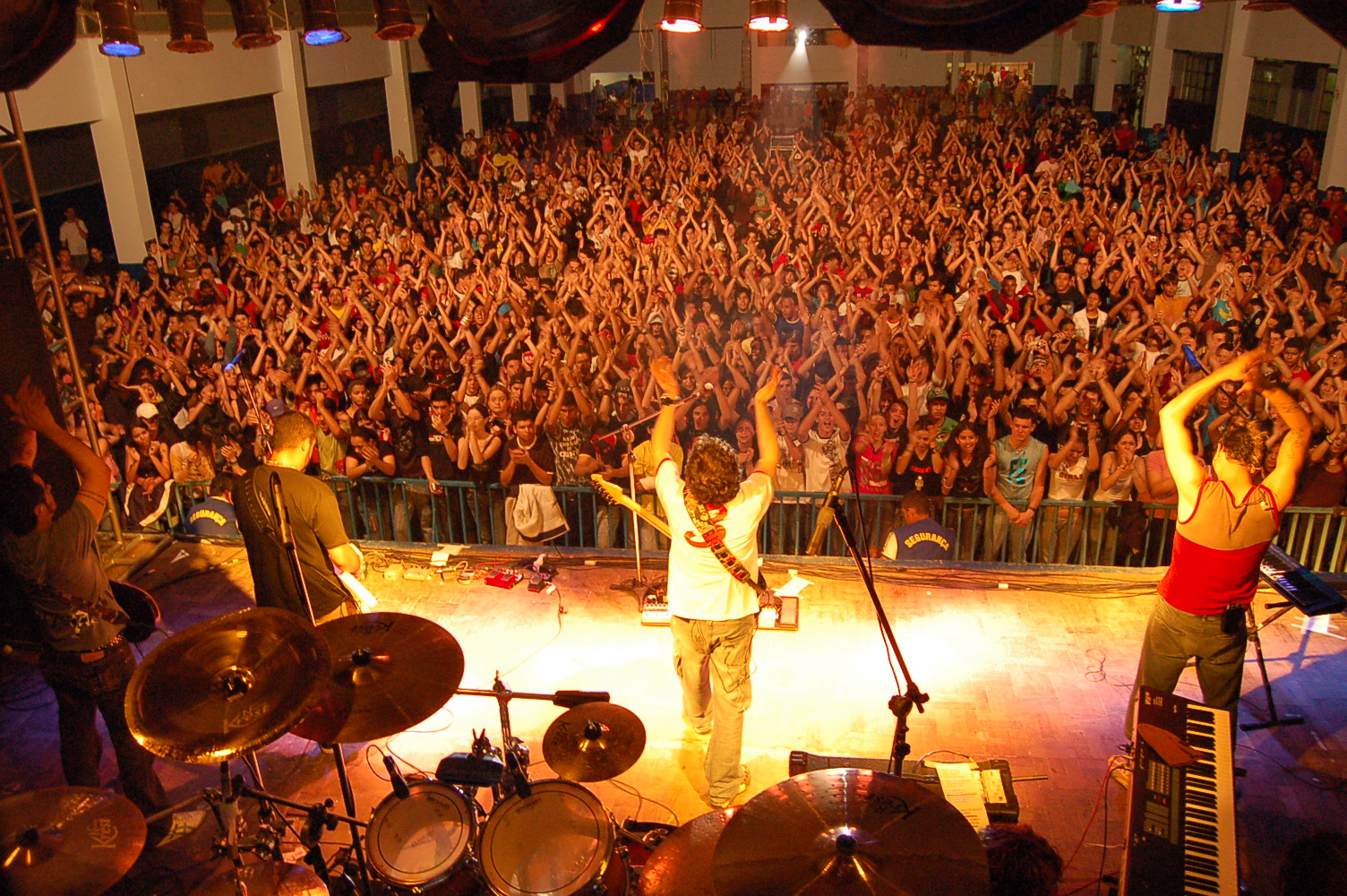 Banda Oficina G3 performando em Sorocaba, São Paulo, durante turnê de divulgação do álbum Além do que os Olhos Podem Ver. A imagem foi fotografada por Ester Tambasco, ex-esposa do baixista Duca Tambasco, e divulgada pela MG Assessoria, assessoria de imprensa da banda Oficina G3 com licença Creative Commons Atribuição 2.0.